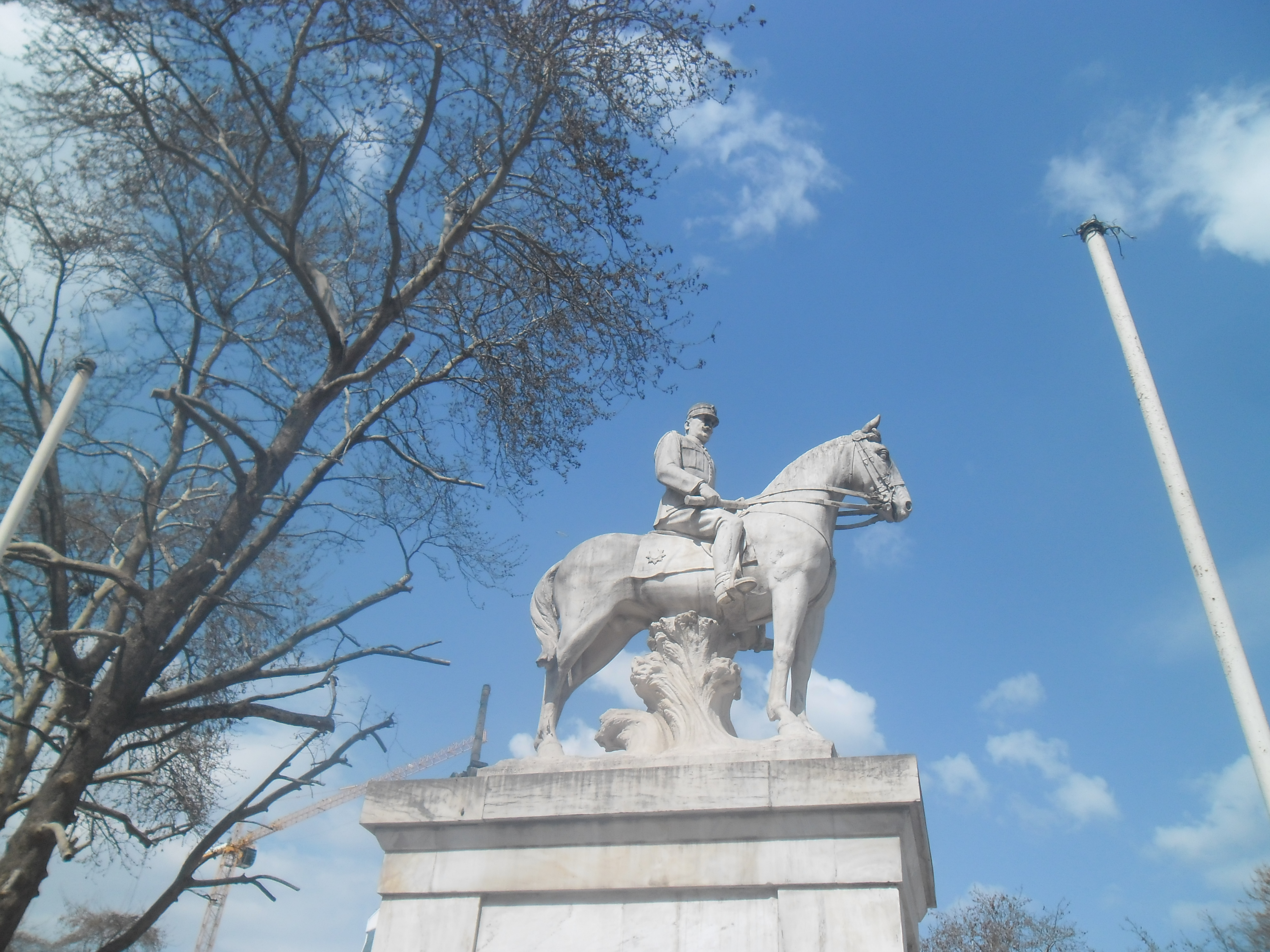 Thessaloniki